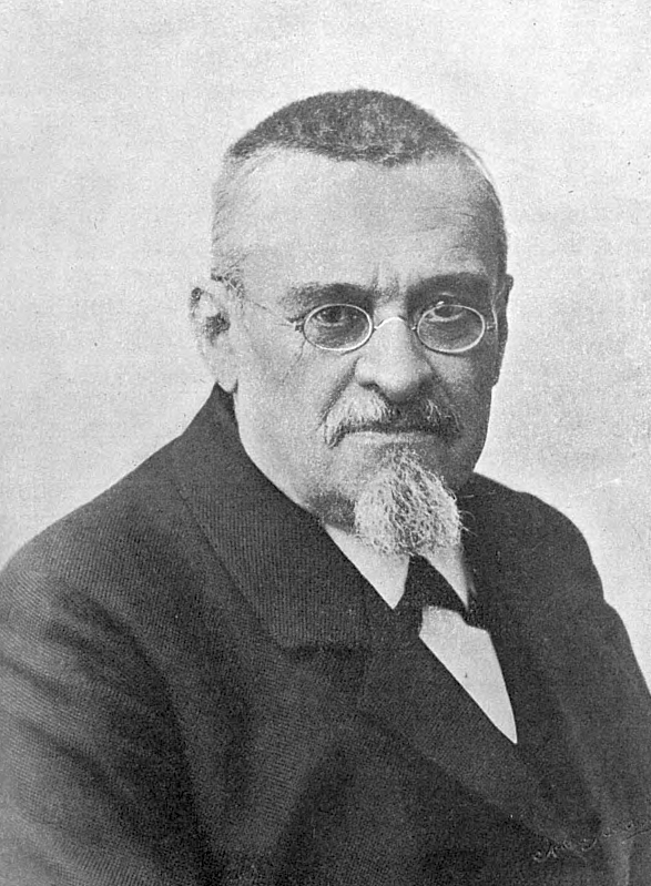 Влади́мир Дани́лович Спасо́вич (польск. Włodzimierz Spasowicz; 16 января 1829, Речица Минской губернии, ныне Гомельской области — 26 октября 1906, Варшава) — русский юрист-правовед, выдающийся адвокат, польский публицист, критик и историк польской литературы, общественный деятель.